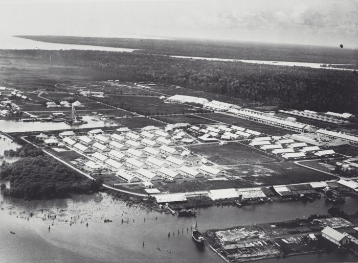 foto. Luchtfoto van de Unie-kampong in de haven van Belawan